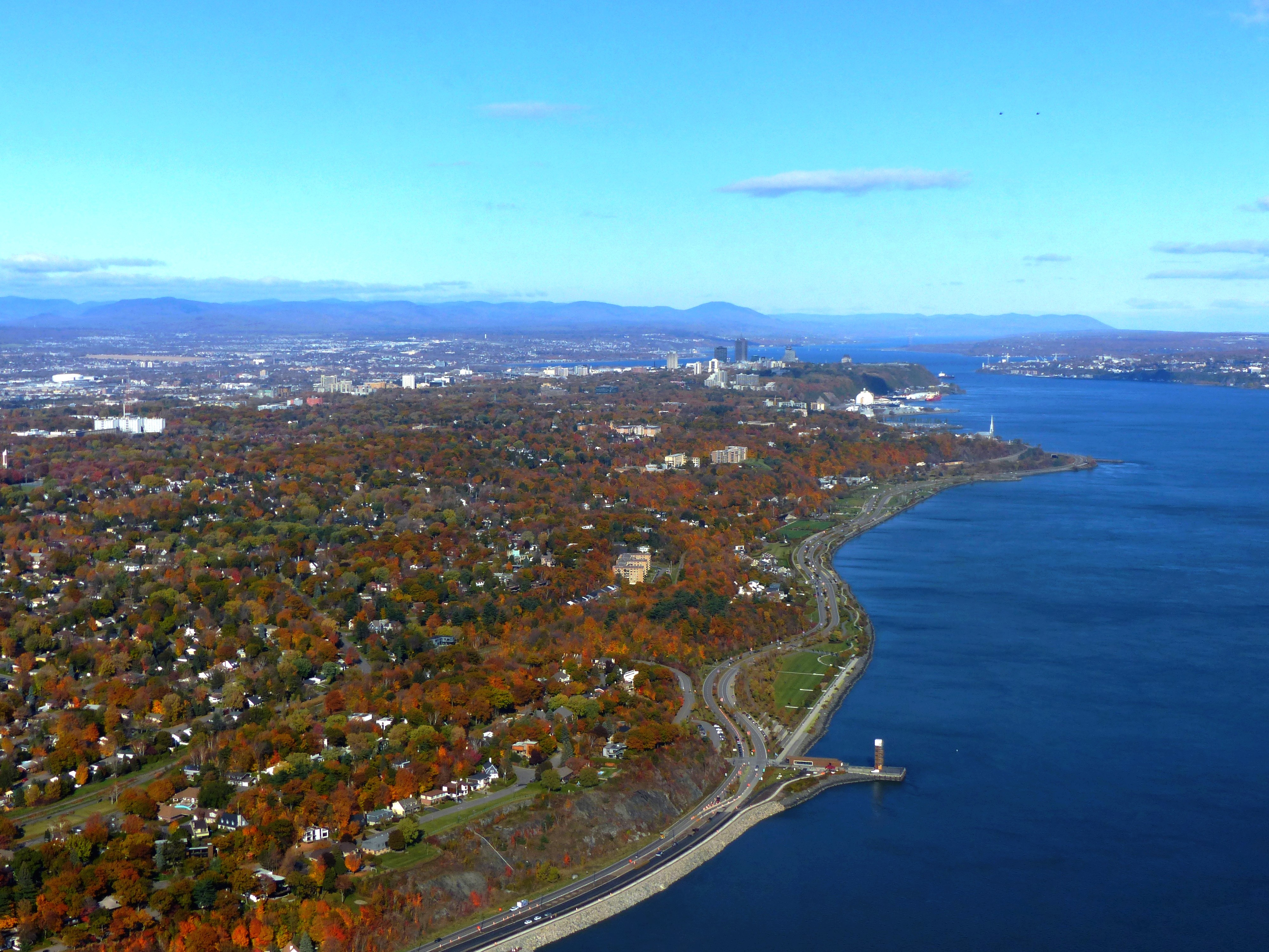 Québec City – Boulevard Champlain - Le Fleuve Saint-Lorent